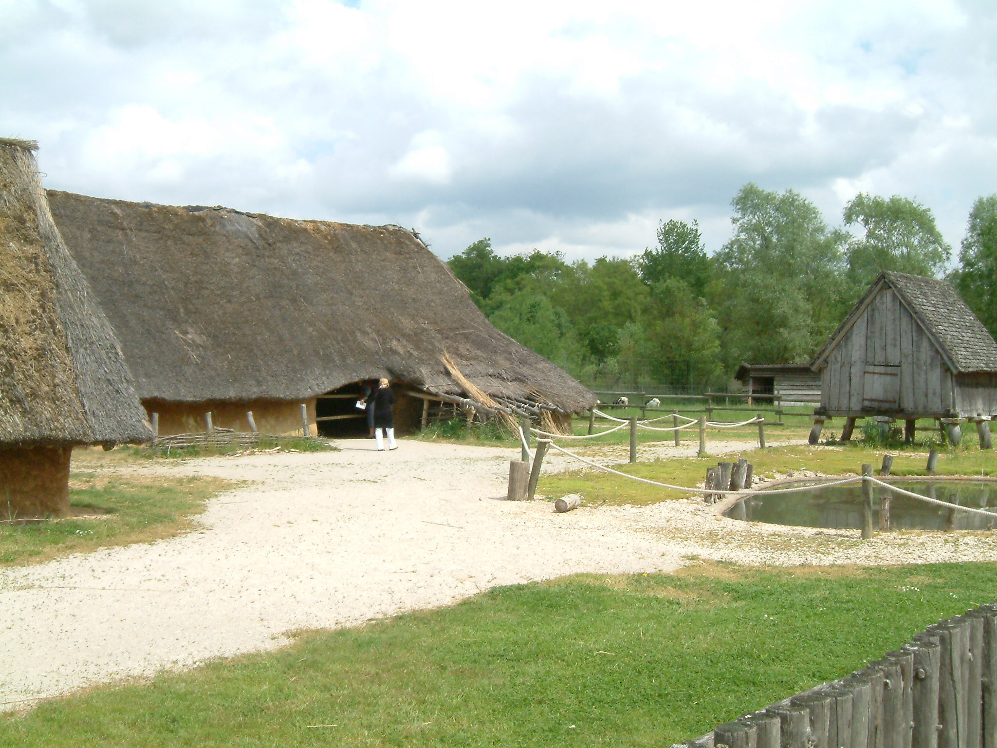 Archéodrome de Beaune, Merceuil, Bourgogne, FRANCE. Reconstitution d'une ferme gauloise.